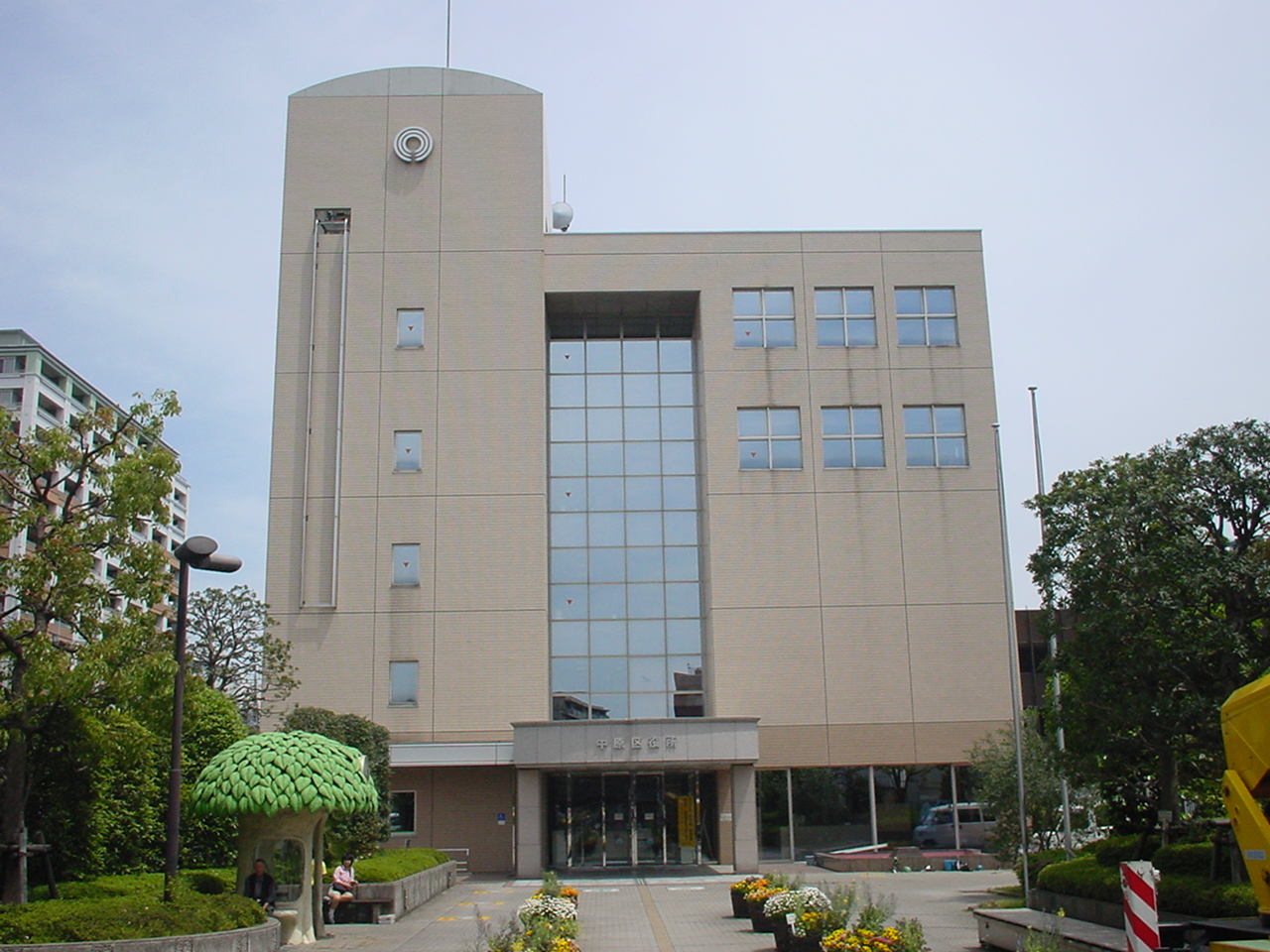 Nakahara-ku Ward Office, Nakahara-ku, Kawasaki, Kanagawa, Japan (中原区役所)